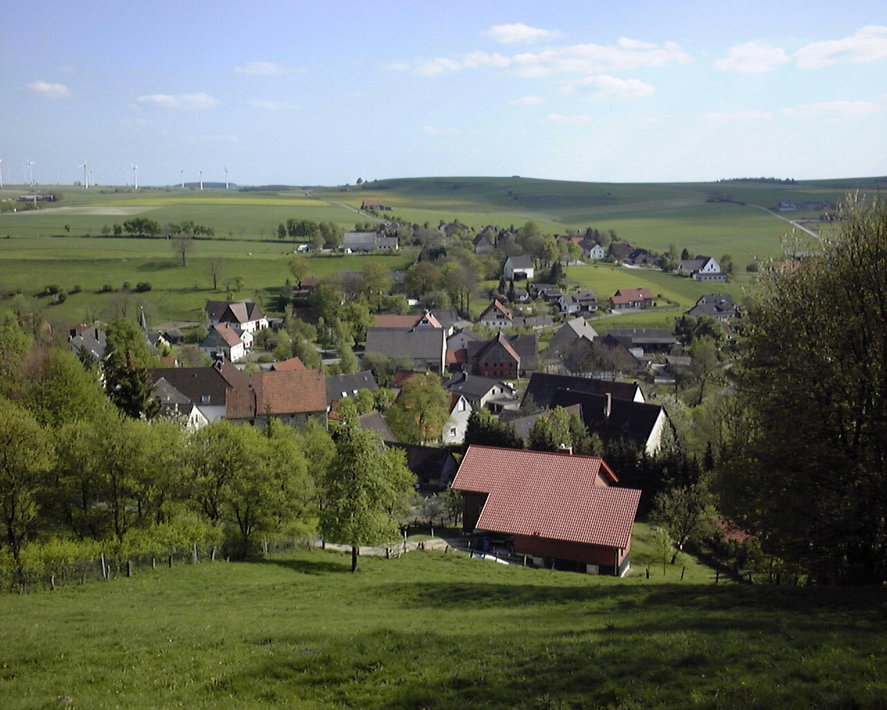 Blick auf Grundsteinheim, der Ort zieht sich noch weiter nach links durchs Tal, Lichtenau (Westfalen)